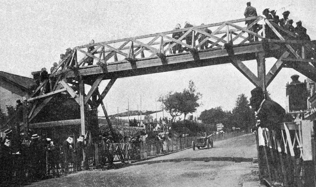 Une passerelle en bois du GP de France 1906.